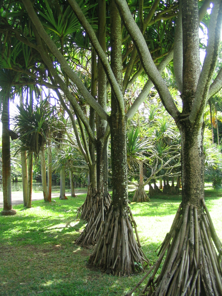 Une vue de jardin de Pamplemousses, Ile Maurice.